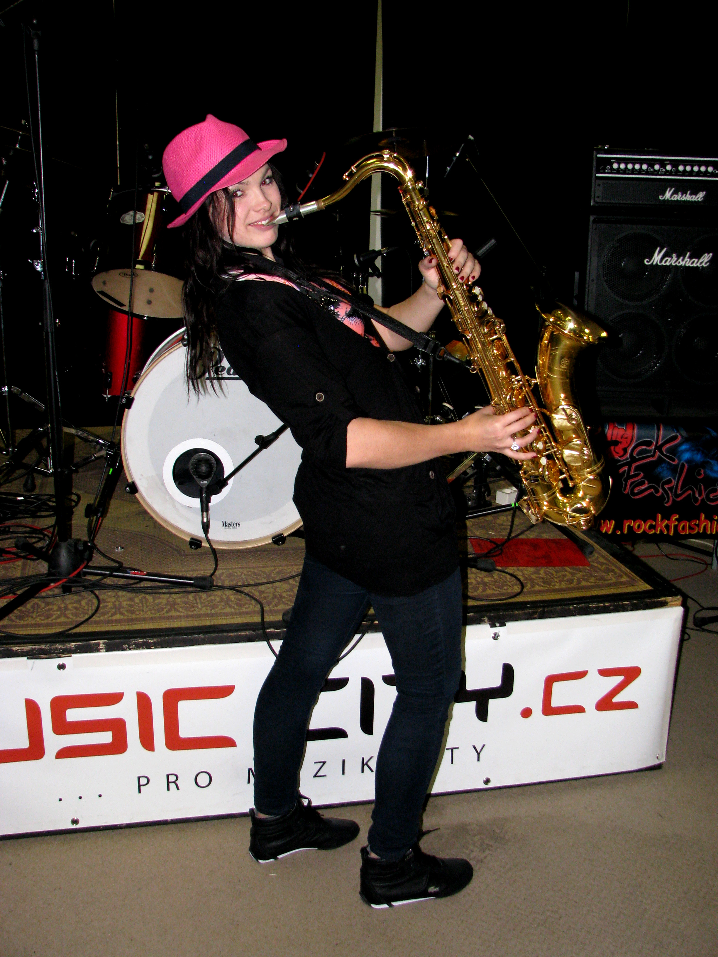 Zpěvačka Kamila Nývltová